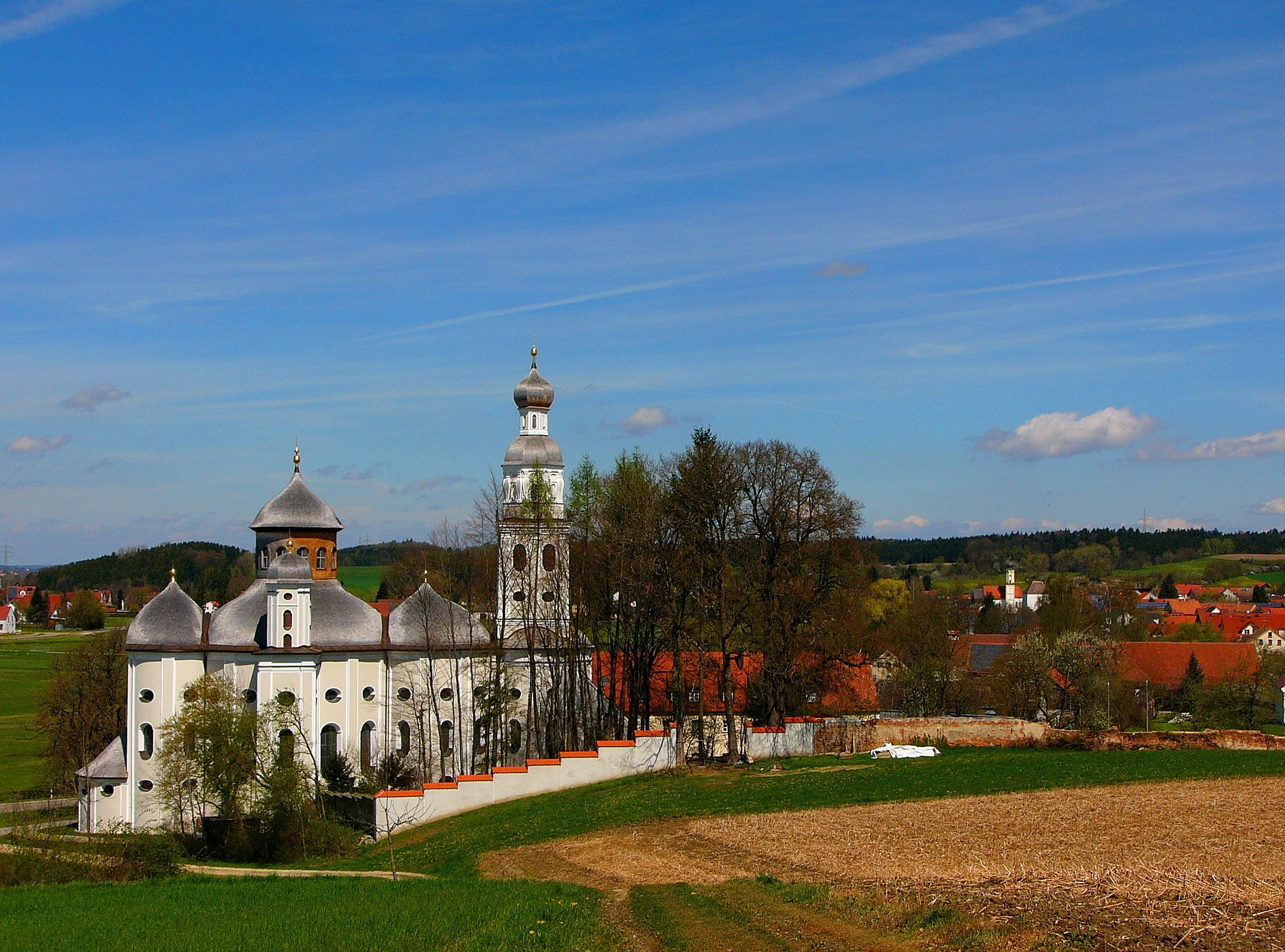 Katholische Wallfahrtskirche Maria Birnbaum, barocker Zentralbau, drei hintereinander angeordnete, pilastergegliederte Kuppelräume mit Türmen, von Constantin Pader, 1661-68; mit Ausstattung. This is a photograph of an architectural monument.